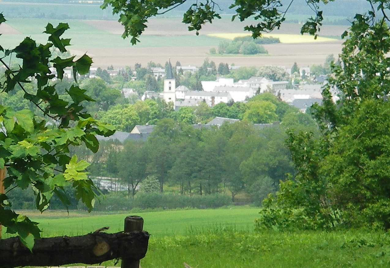 Schleiz